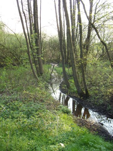 Naturschutzgebiet „Obere Ihleniederung“